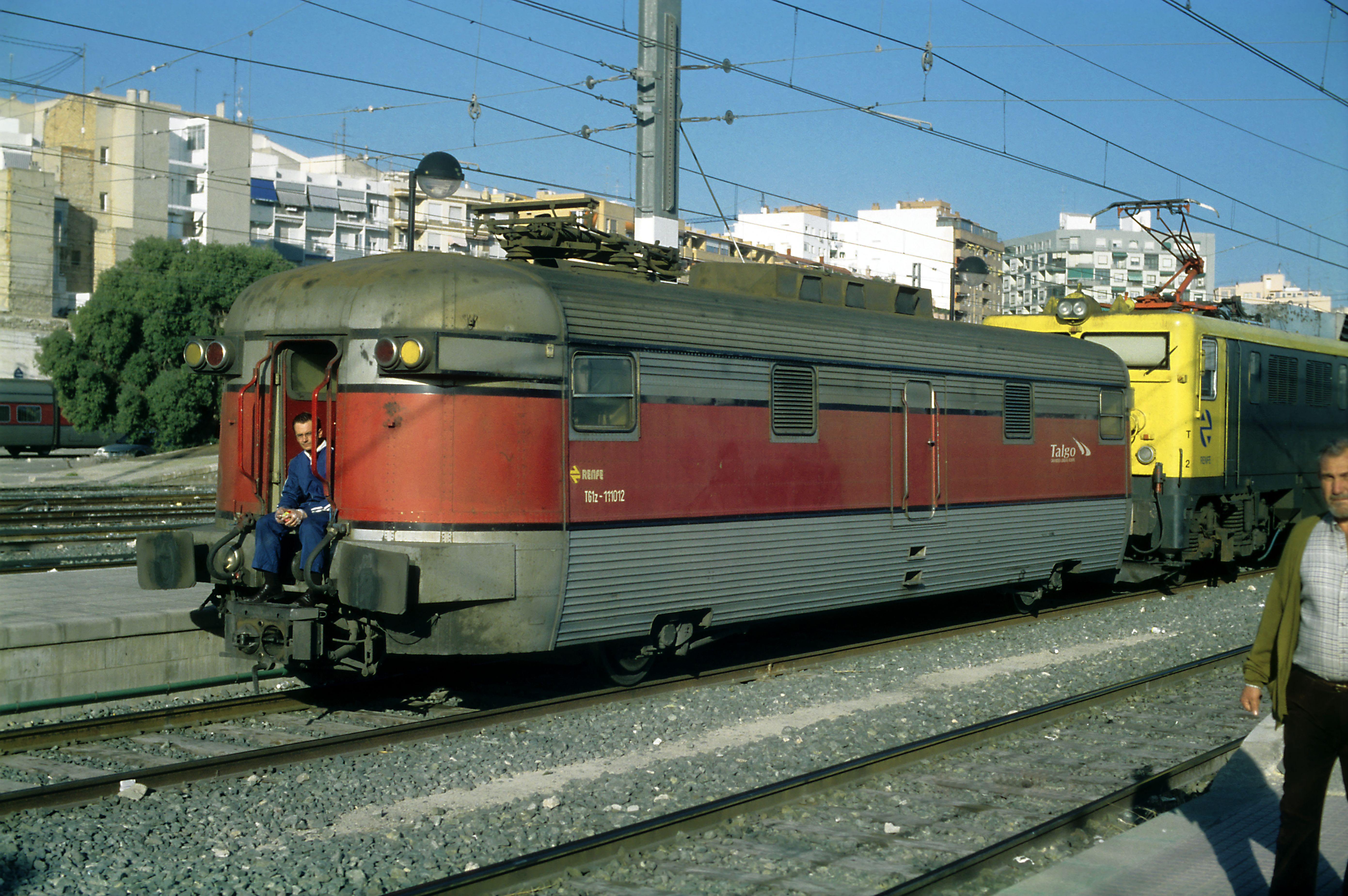 Diese Generatorwagen wurden gebaut, um die Talgo-III-Wagenzüge mit anderen als den dafür gebauten Dieselloks der BR 351-354 bespannen zu können. Die Generatorwagen verfügen über Regelschrauben- und Talgo-Scharfenbergkupplungen. Über den Dachstromabnehmer funktioniert die Energieversorgung im Stand auch unbespannt.